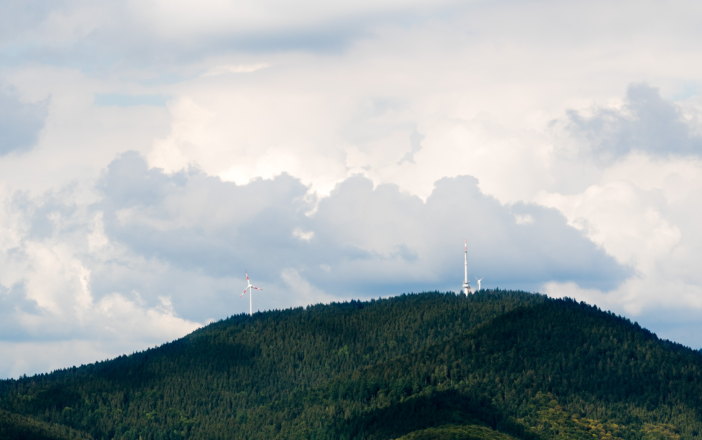 Der Brandenkopf aus südlicher Richtung.